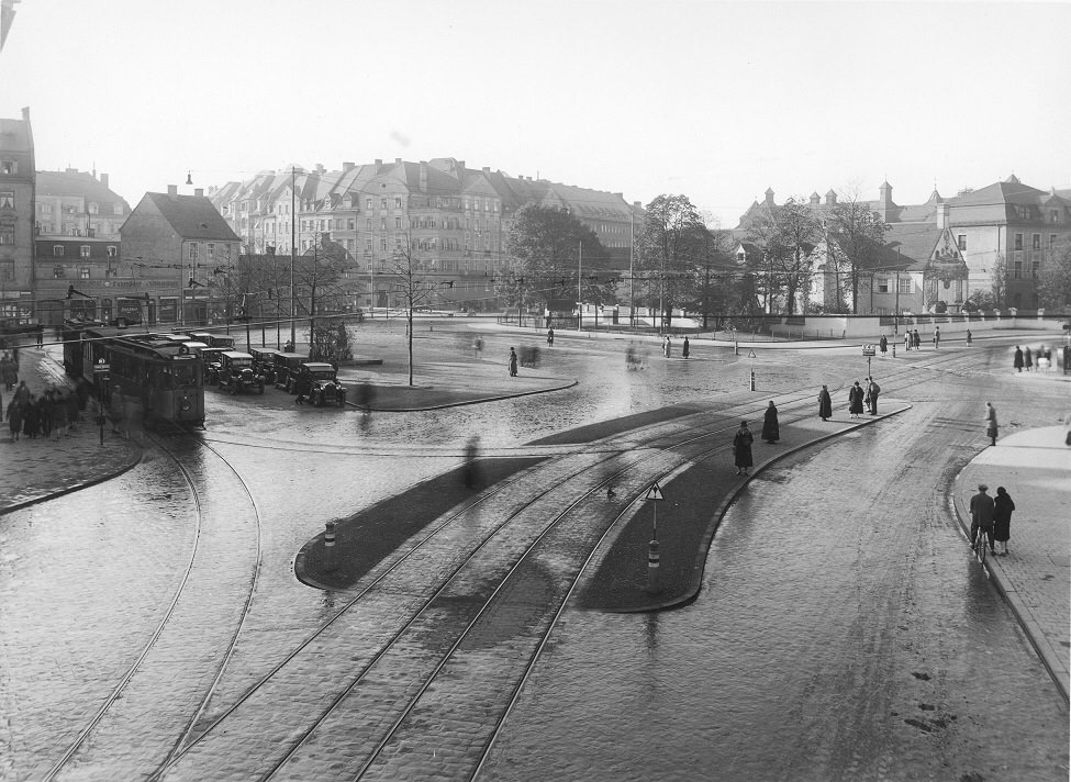 Ansicht des Münchner Rotkreuzplatzes im Jahr 1928. Links im Bild eine Tram der Linie 3, in der Straßenmitte warten Fahrgäste an der Haltestellen für die Linien 1, 4 und 11.